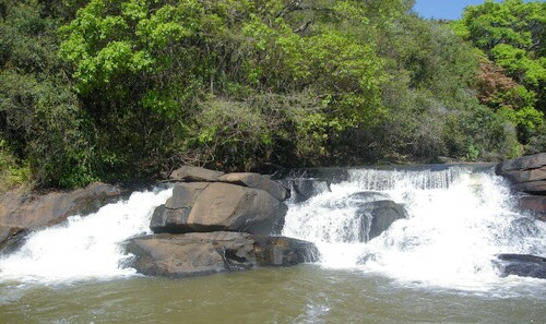 Cachoeira do rio Muzambo no limite dos municípios de Divisa Nova e Serrania.